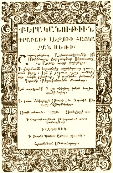 Грамматика